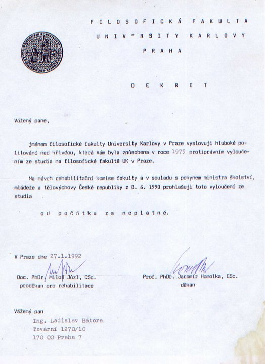 Rehabilatiční dekret, kterým se označuje vyloučení Ladislava Bátory z roku 1975 za od počátku neplatné